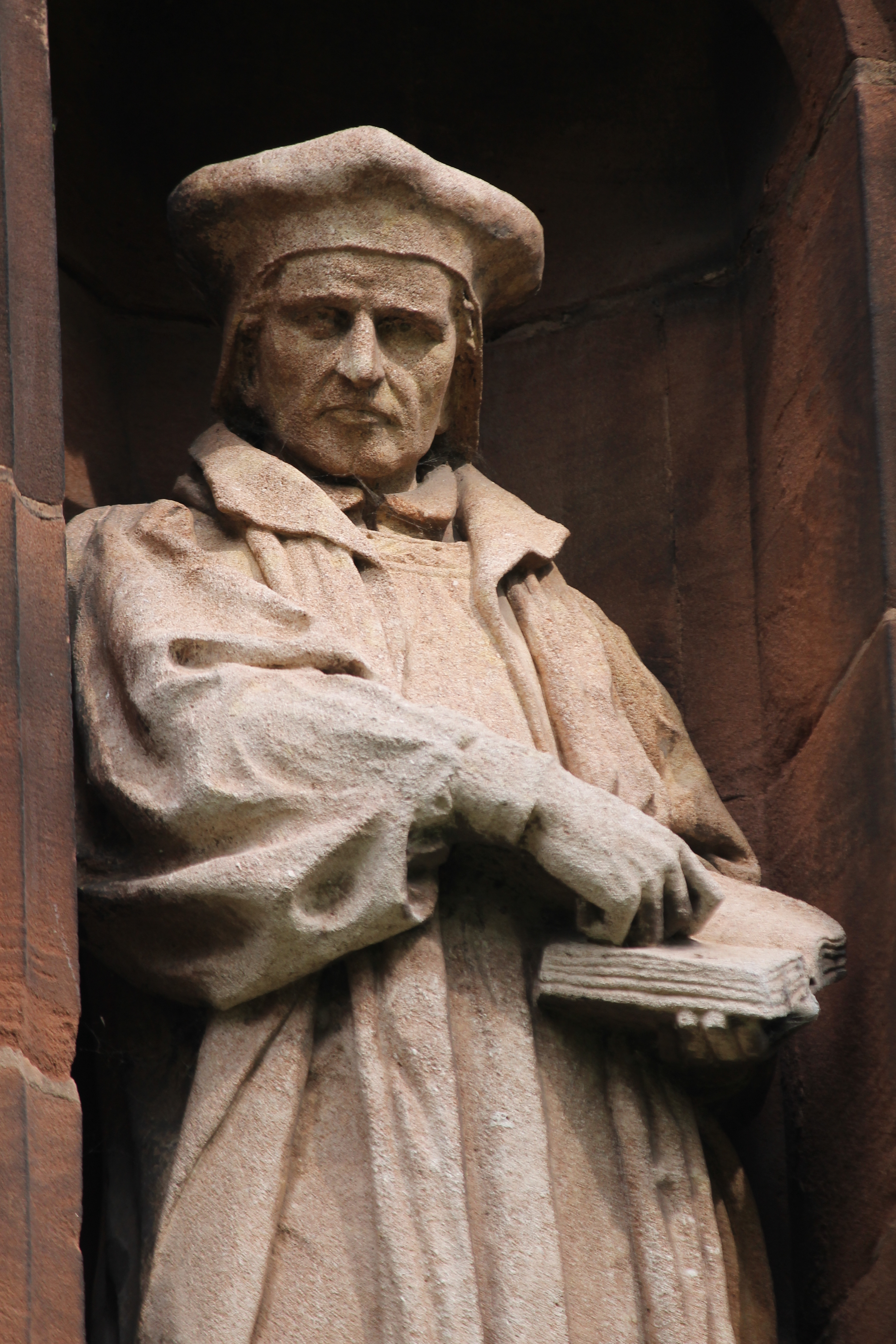 Richard Parry, Cofeb Llanelwy